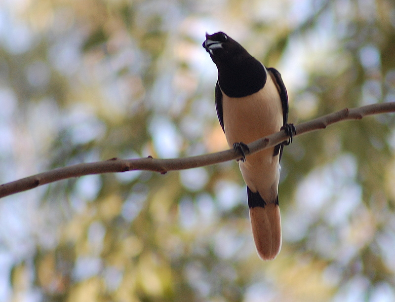 Reserva ambiental, Horto Florestal na cidade de Piraju-SP